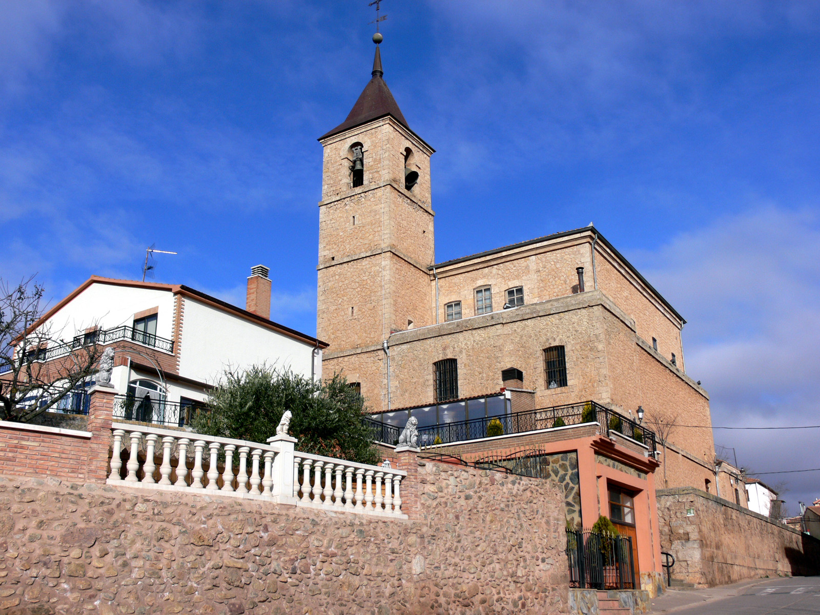 Iglesia de Santa Eulalia de Mérida en Berceo, La Rioja - España.